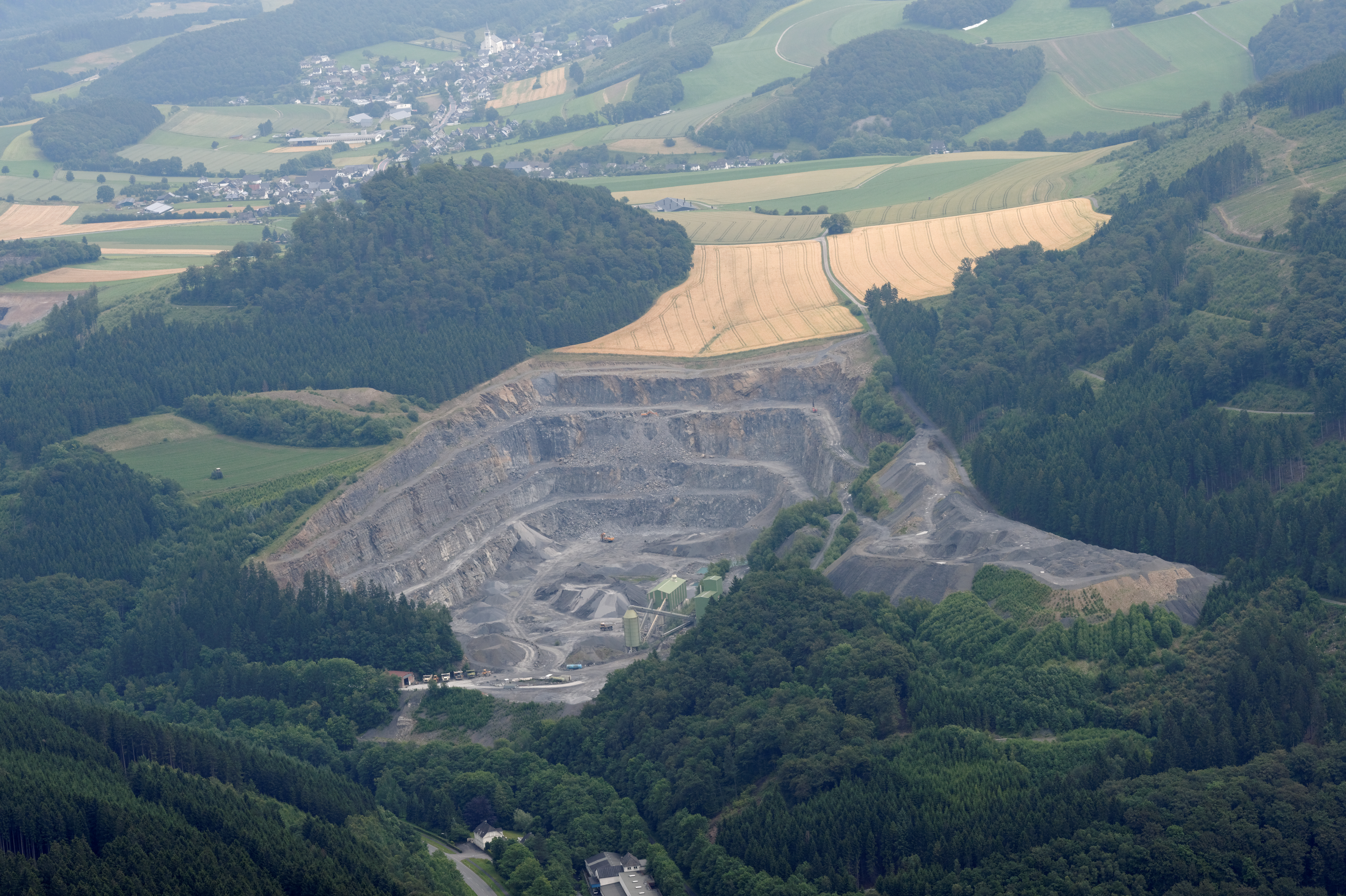 Fotoflug Sauerland-Nord. Meschede: Steinbruch am Wallenstein, Naturschutzgebiet Wallenstein mit Wallen und Calle im Hintergrund, Blickrichtung Ost.